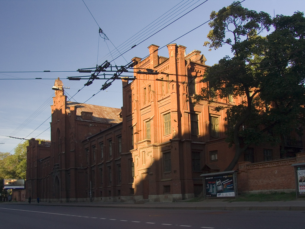 Здание Физиопульмонологического института в Санкт-Петербурге (Лиговский проспект, 2-4)